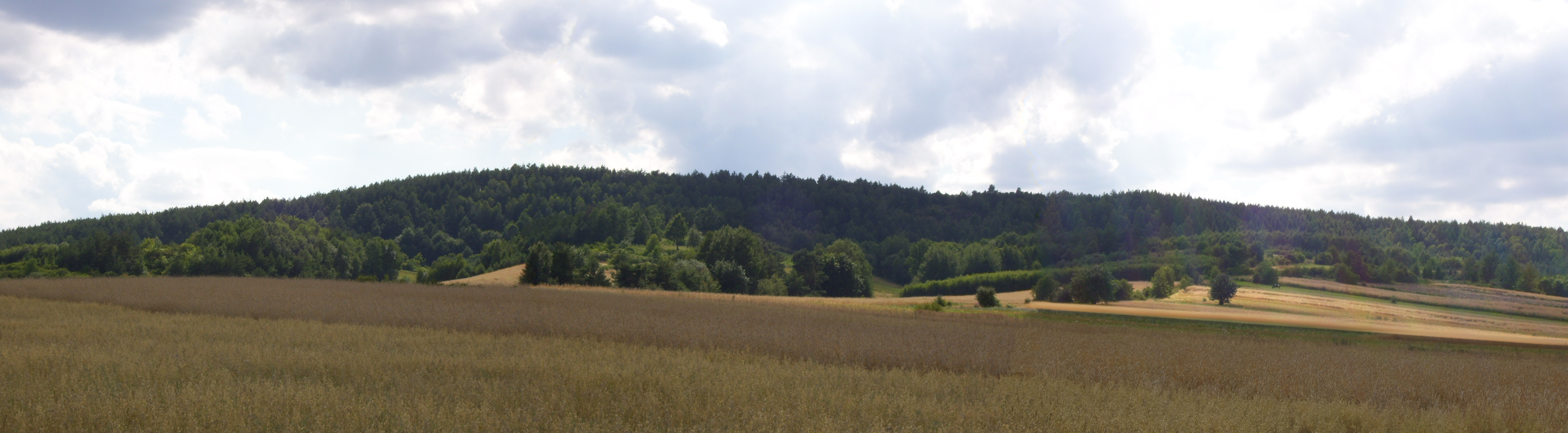 Wzniesienie Fajna Ryba w okolicach Przedborza